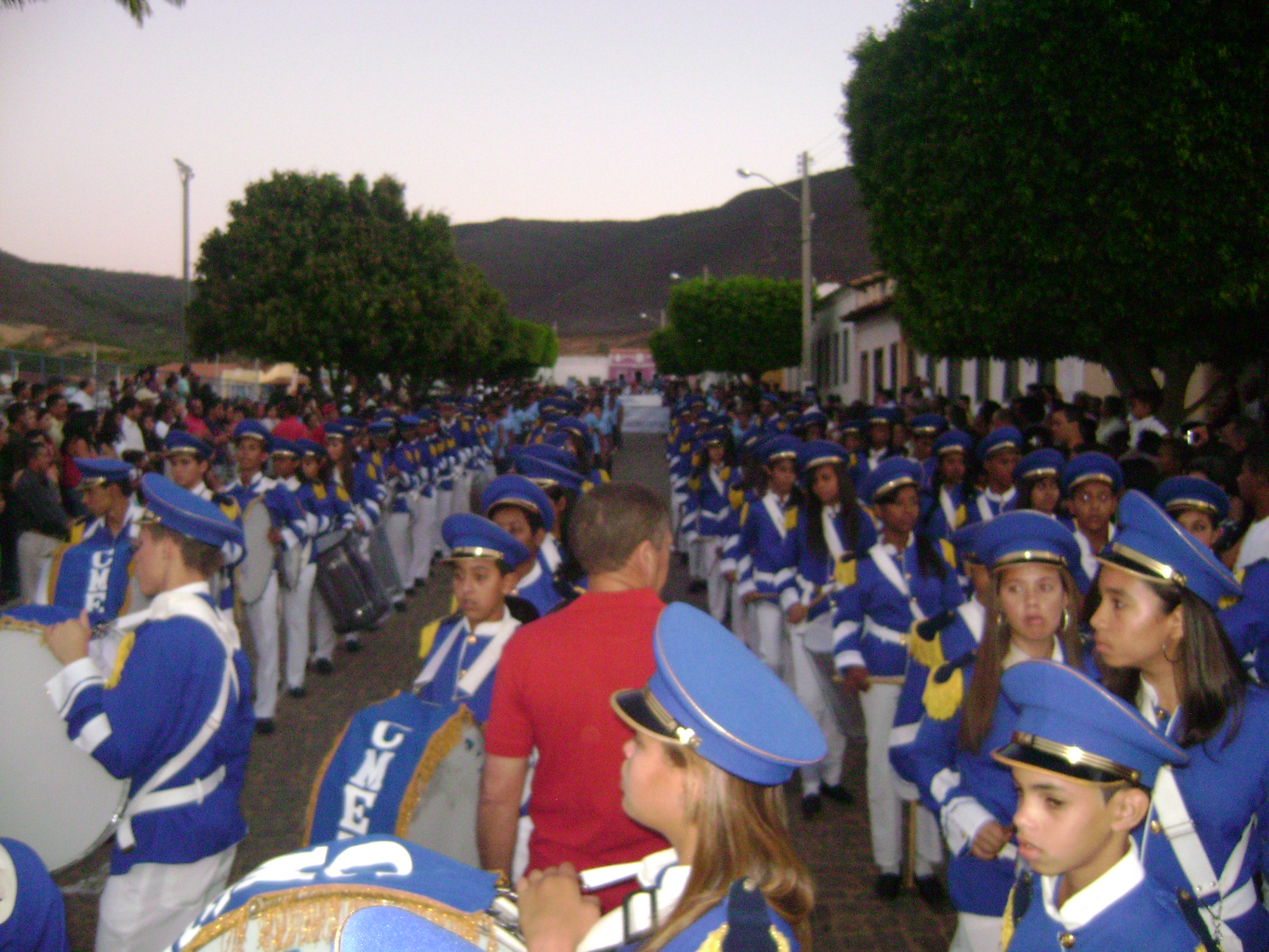 Desfile Civico alegorico em Palmas de Monte Alto-BA